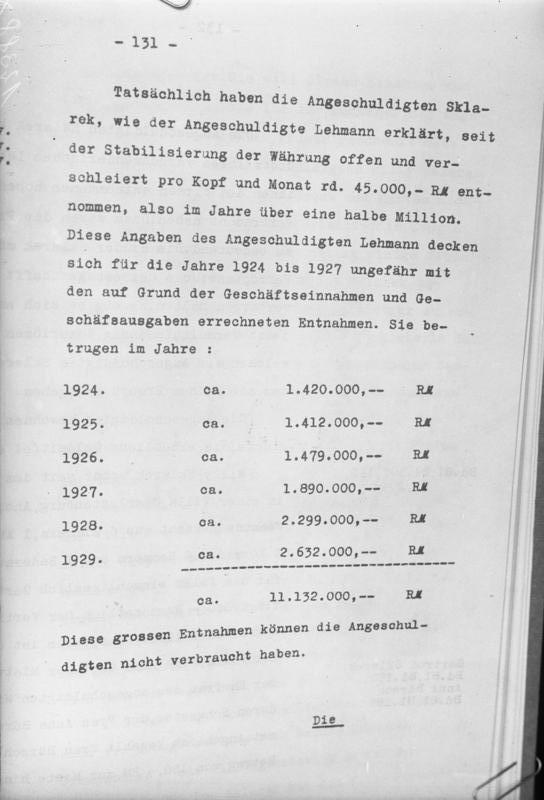 Der kommende Sklarek-Prozess am 13. Oktober spricht Bände! Eine der interessantesten Seiten der Anklageschrift. Sie besagt, dass jeder der Brüder Sklarek M 45.000,-- im Monat angeblich für sich verbraucht hat. In den 6 Jahren ihrer Tätigkeit haben die Brüder Sklarek 11 Millionen, 132 tausend Mark entnommen, welche Summe sie aber unmöglich für sich verbraucht haben können.